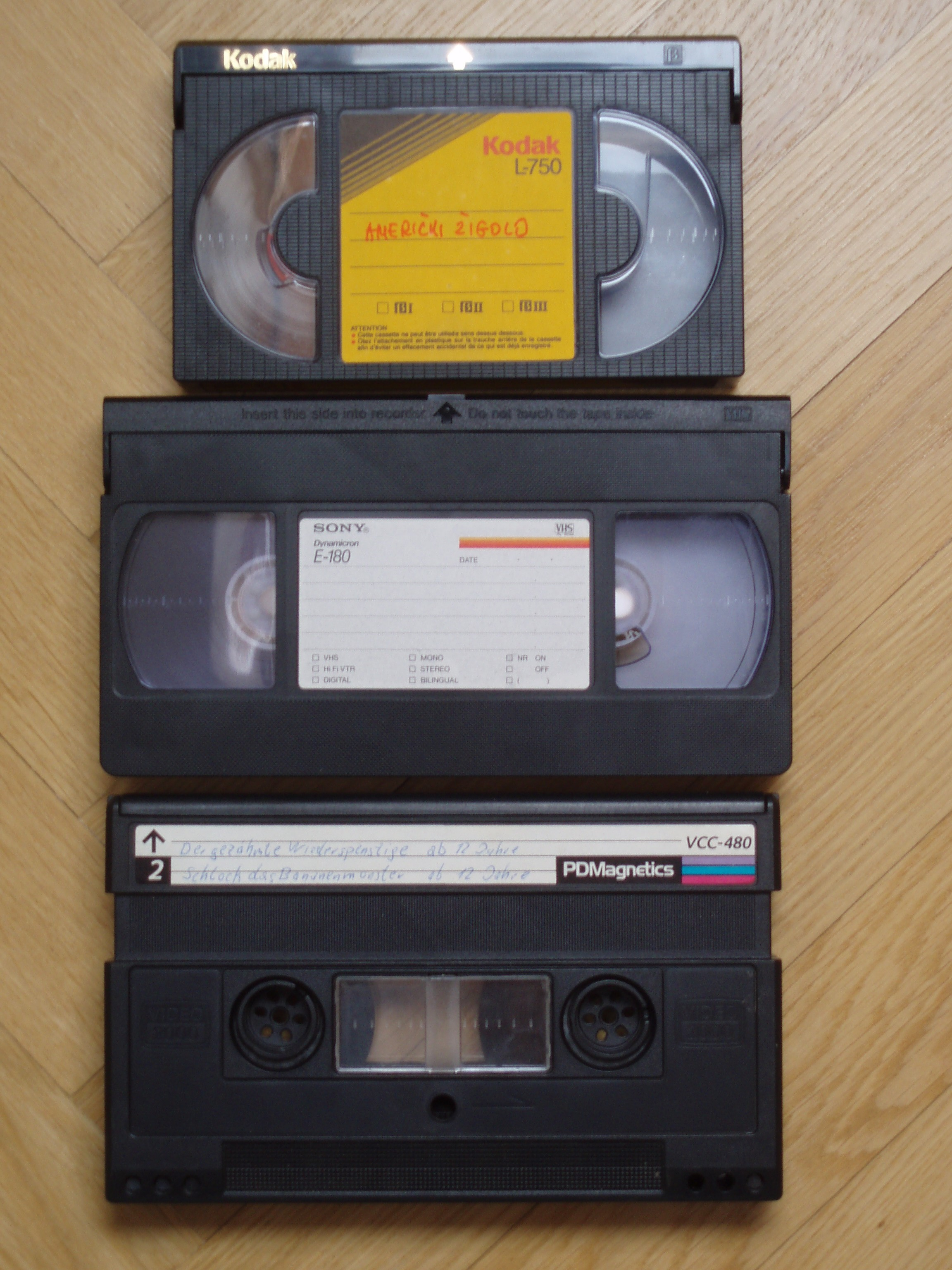 Beta, VHS és Video2000 rendszerű kazetták